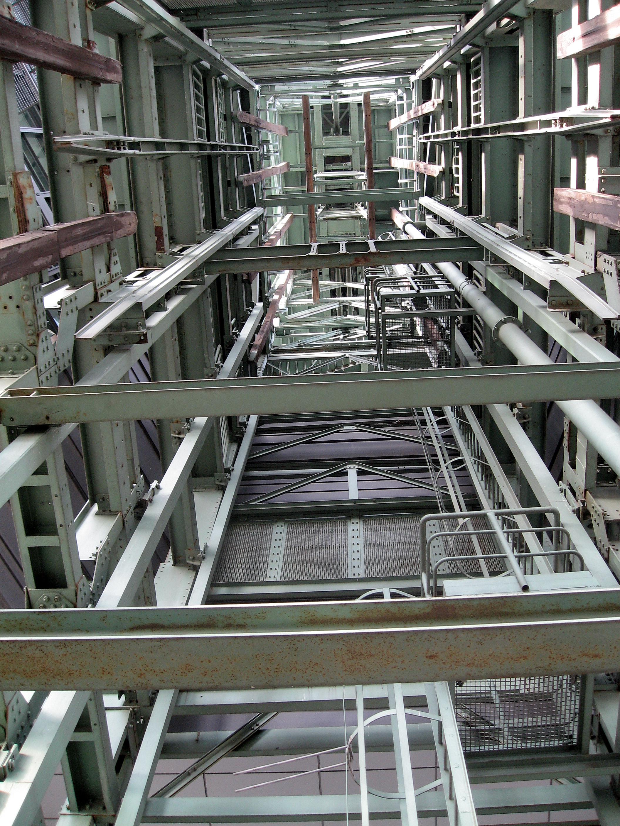 Dortmund, Eving, Zeche Minister Stein, Hammerkopfturm, Förderschacht von unten